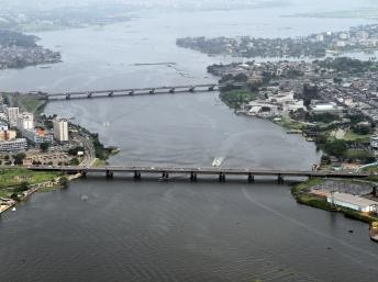 Le pont Félix-Houphouet Boigny